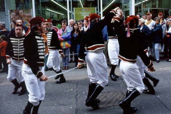 Handsworth Schwerttänzer / Beschreibung: Die Schwerttänzer aus Handsworth, beim World Millennium Sword Spectacular, Whitby, Mai 2000.